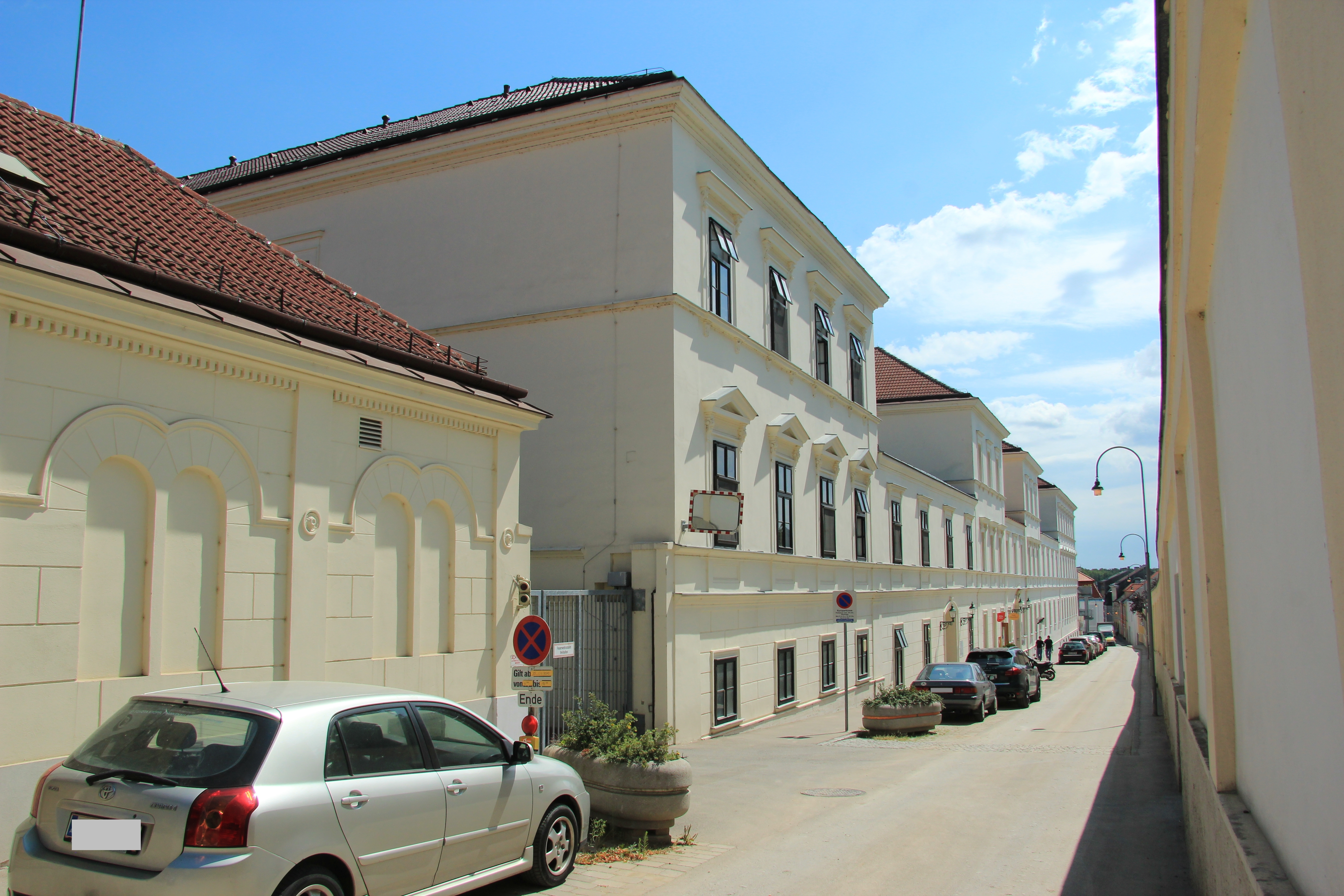 Pflegeheim der Stadt Wien, sog. Altbau Object location48° 18′ 44.6″ N, 16° 19′ 19.88″ E